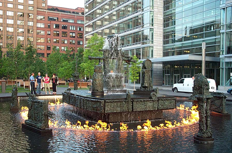 La Joute by Jean-Paul Riopelle, in the Place Jean-Paul-Riopelle, Montreal. La joute de Jean-Paul Riopelle, dans la place Jean-Paul-Riopelle, Montréal.